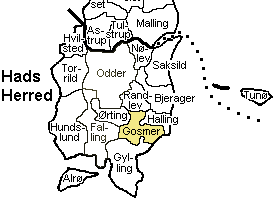 Kort der viser Gosmer Sogn, Hads Herred, Århus Amt, Denmark.